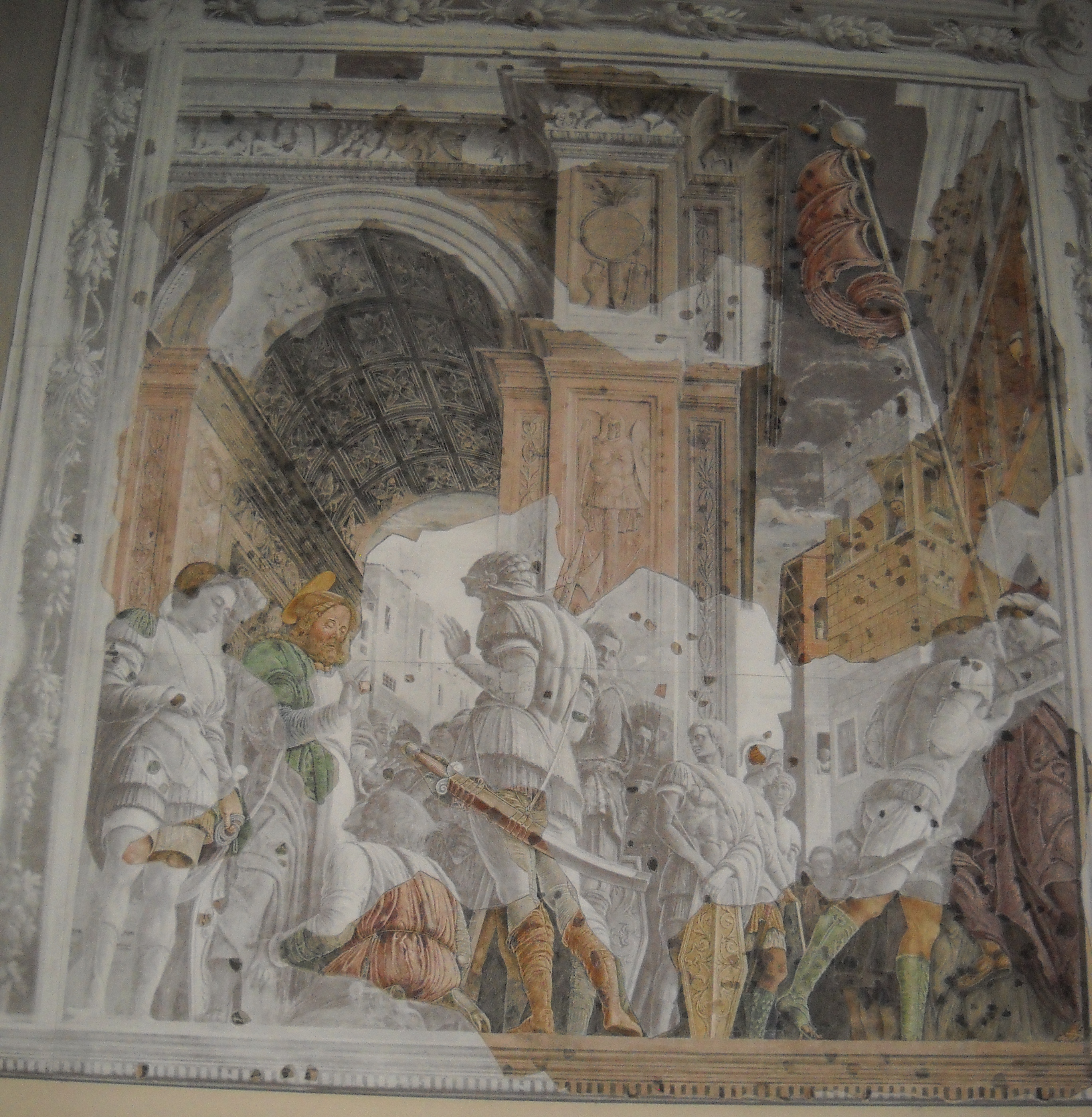 Cappella Ovetari, Chiesa degli Eremitani a Padova. Dipinto dopo il restauro.